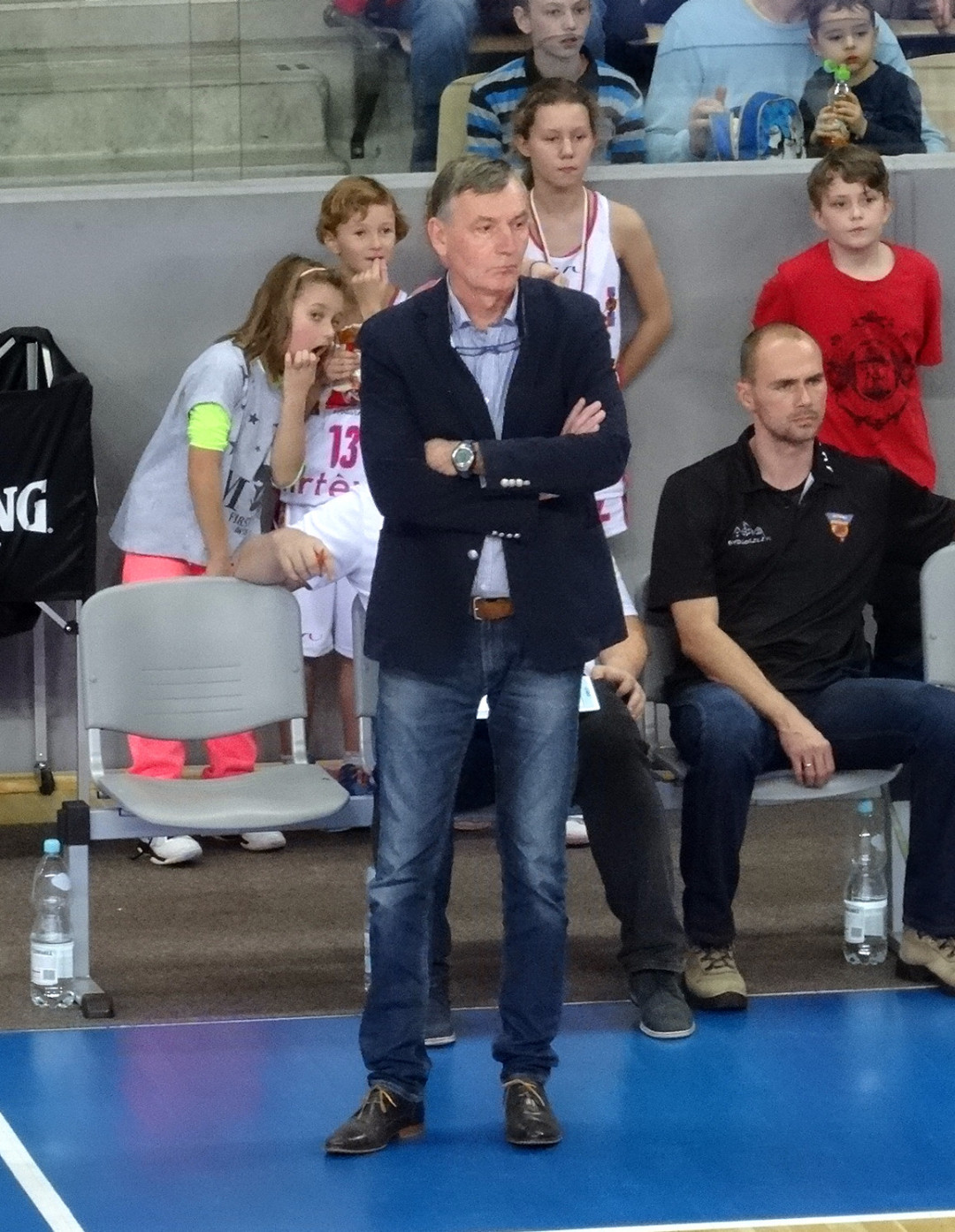 Mecz Polskiej Ligi Koszykówki Kobiet (Basket Liga Kobiet) Artego Bydgoszcz - Energa Toruń, 7 listopada 2015 roku w Artego-Arenie w Bydgoszczy